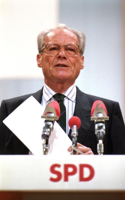 30.8.-2.9.1988 SPD-Parteitag in Münster, Halle Münsterland